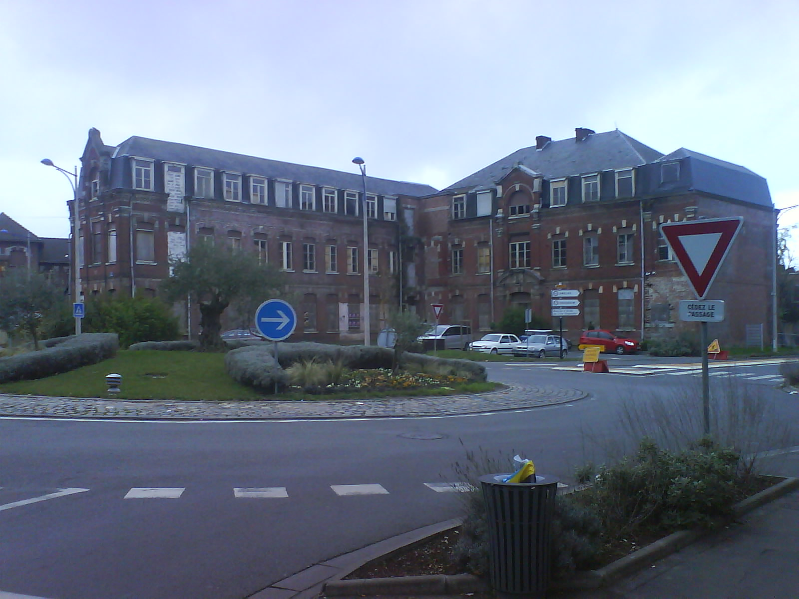 Hôpital J.Luxembourg construit en 1878, aujourd'hui abandonné, Novembre 2010